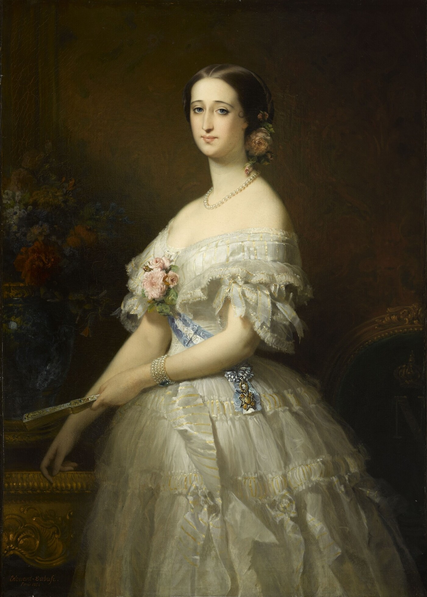 Eugénie de Montijo, impératrice des Français, représentée en robe de bal. Eugénie de Montijo de Guzman (1826-1920), impératrice des Français.